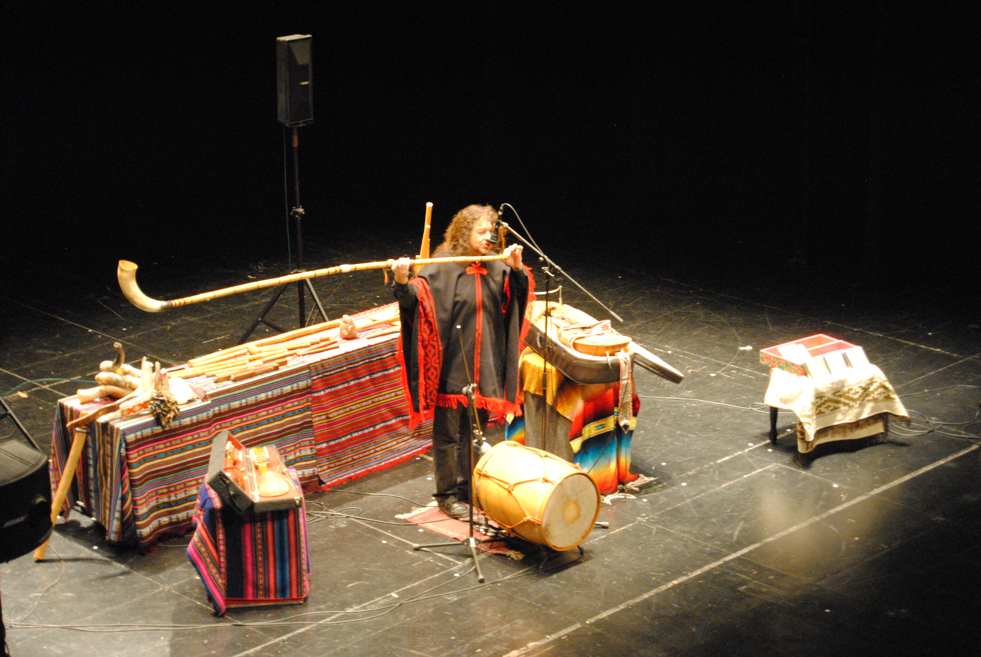 Trompeta andina que se toca de costado